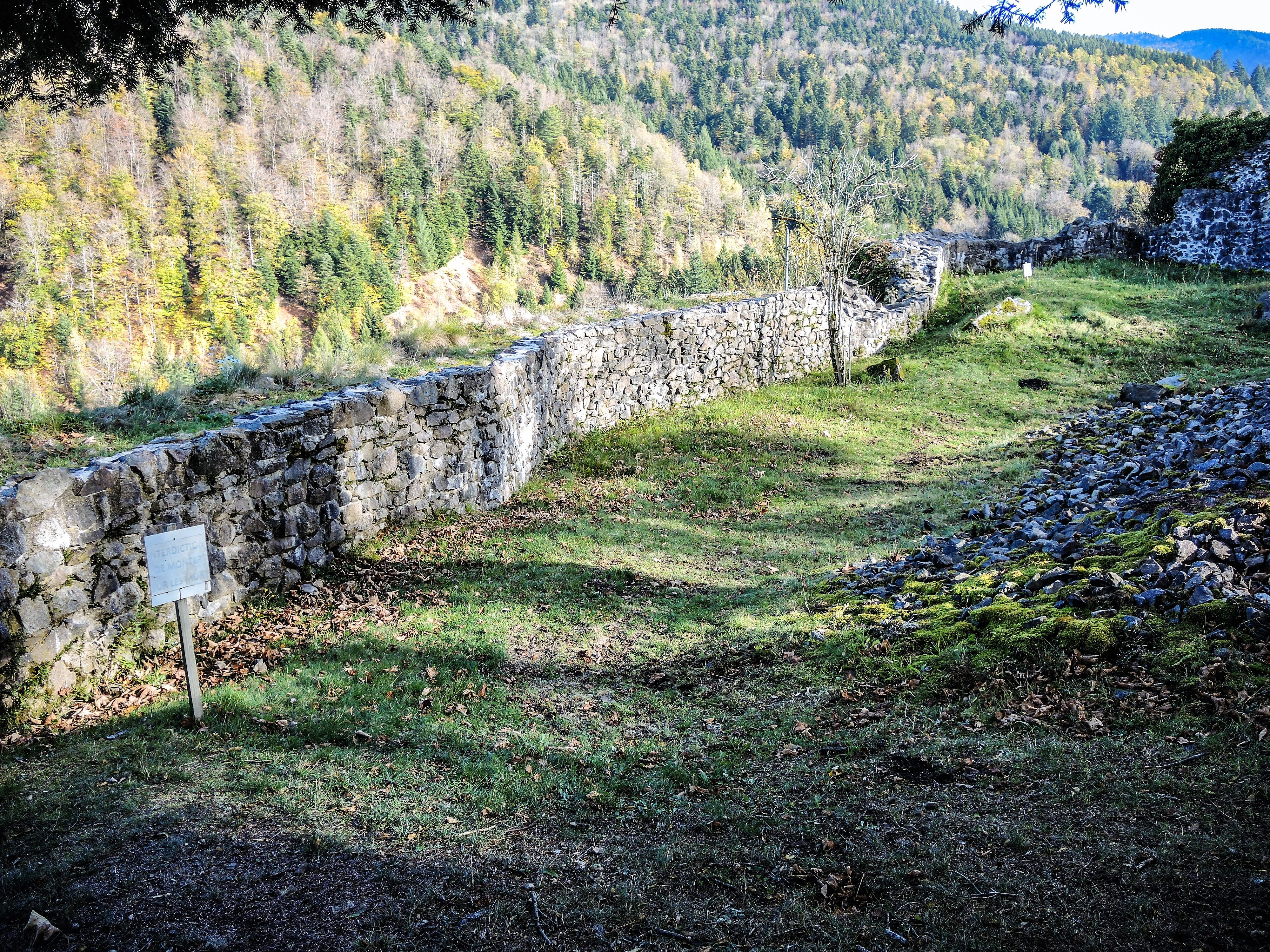 Schlossberg. Muraille est et première enceinte, ou basse-cour, du château. Kruth. Haut-Rhin.